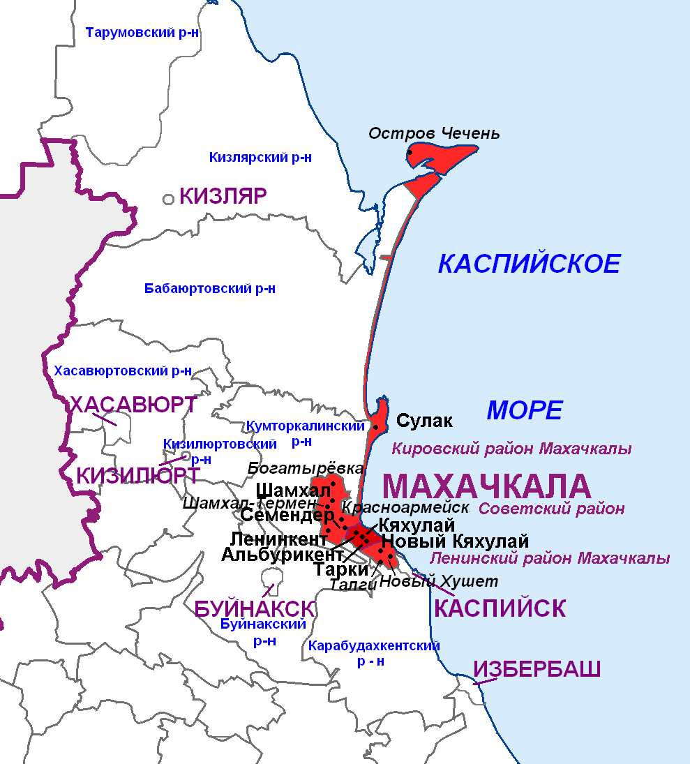 Махачкала: районы и подчинённые населённые пункты